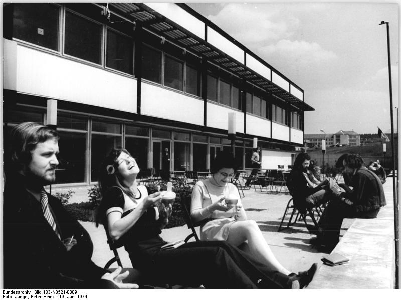 Ilmenau, Mensa ADN-ZB Deutsche Demokratische Republik 19.6.1974 schw TH Ilmenau - Sozialistische Bildungsstätte der DDR Nich zu einem Sanatorium oder Urlauberhotel gehört diese luftige Terrasse, auf der sich diese jungen Leute entspannen, diskutieren oder einfach Eis löffeln können. Auf dem Ehrenberg von Ilmenau (DDR Bezirk Suhl) hat sich zu den Gebäuden der 50er und 60er Jahre diese neue Mensa gestellt.(unser Foto). Die Studenten erhalten hier ein wohlschmeckendes Essen oder können sich an den Wochenenden und Feiertagen ganztägig verpflegen lassen. Weiterhin sind im Mensagebäude eine moderne Gaststätte, eine Bierstube, ein Frühstückscafè und eine Milch- und Eisbar untergebracht. Dank der großzügigen Investitionspolitik des Arbeiter- und Bauer-Staates wurden soviel Internatsplätze geschaffen, Daß etwa 90 Prozent aller Studierenden der TH Ilmenau im Hochschulgebäude wohnen. Der Tagessatz für die Vollverpflegung beträgt etwa 2,60 Mark und die monatliche Miete in einer Dreizimmerwohnung mit Bad und Küche, die sich jeweils sechs Studenten teilen, beträgt pro Person 10 Mark. Foto. Junge Copyright: ADN-Zentralbild Bitte beachten Sie hierzu den Begleittext und die Fotos: N 0521-305 - N 0521-308 N sowie 1 N!